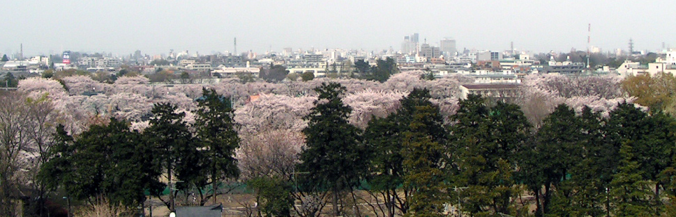 杉並 - 旧NHKグラウンドの桜